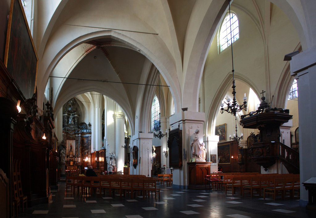 Sint Niklaaskerk, Brussel